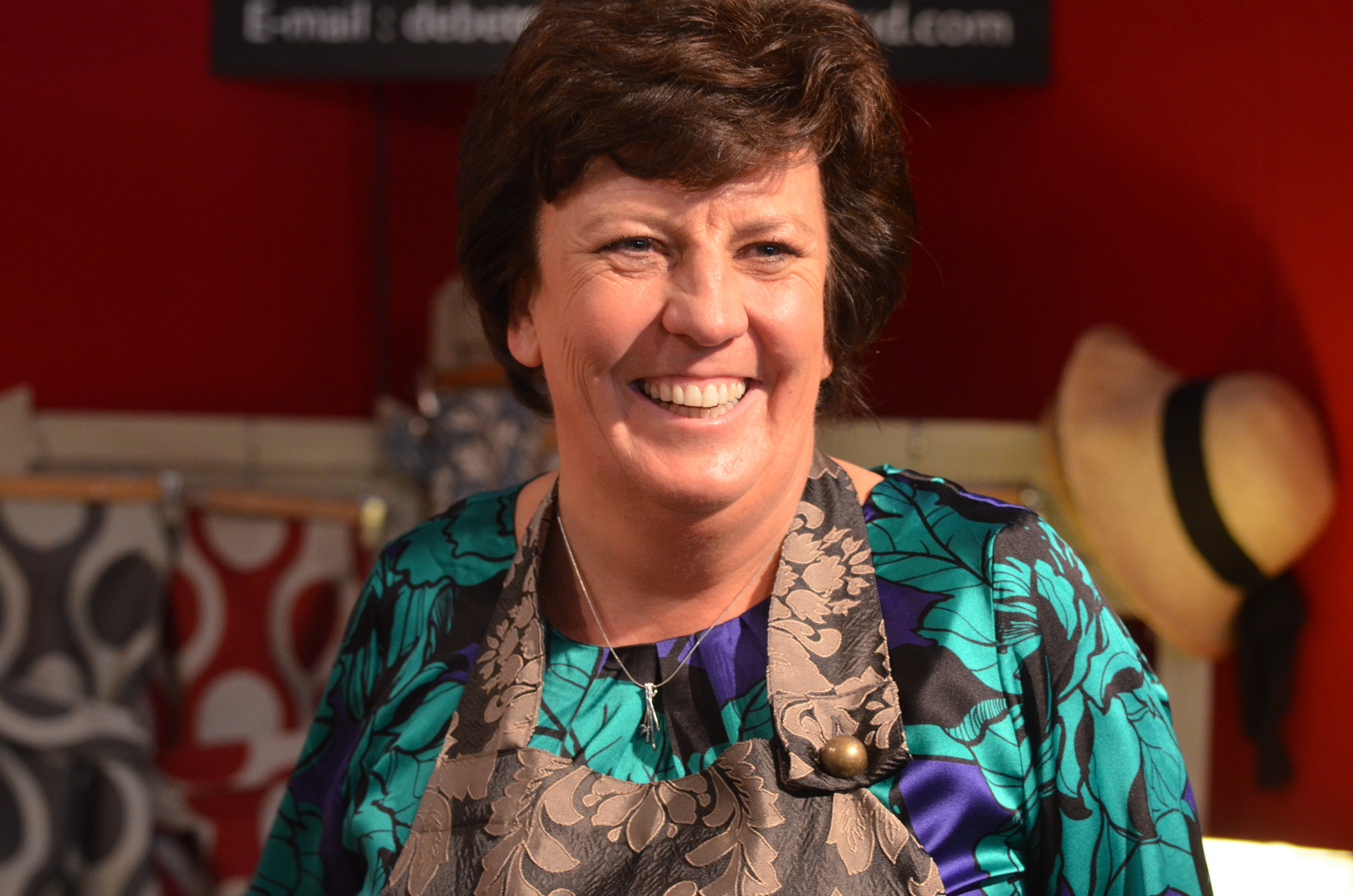 Ingrid Lieten